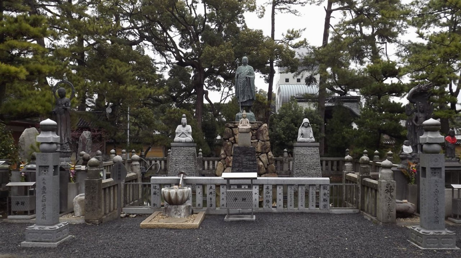 善通寺の御影池